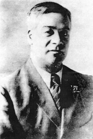 Luis Emilio Recabarren (1876 - 1924)